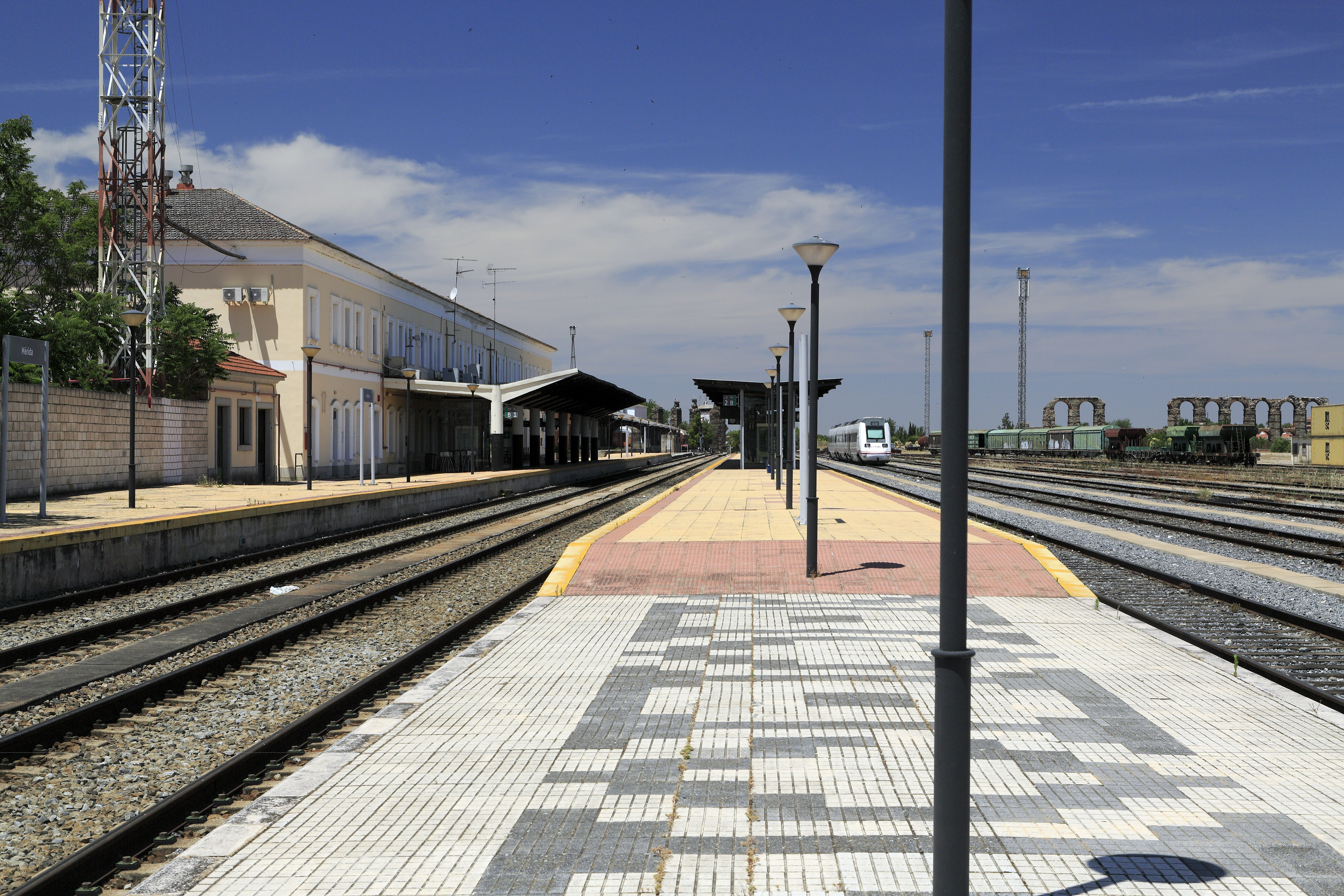 Richtung Westen, im Hintergrund der römische Acueducto de los Milagros